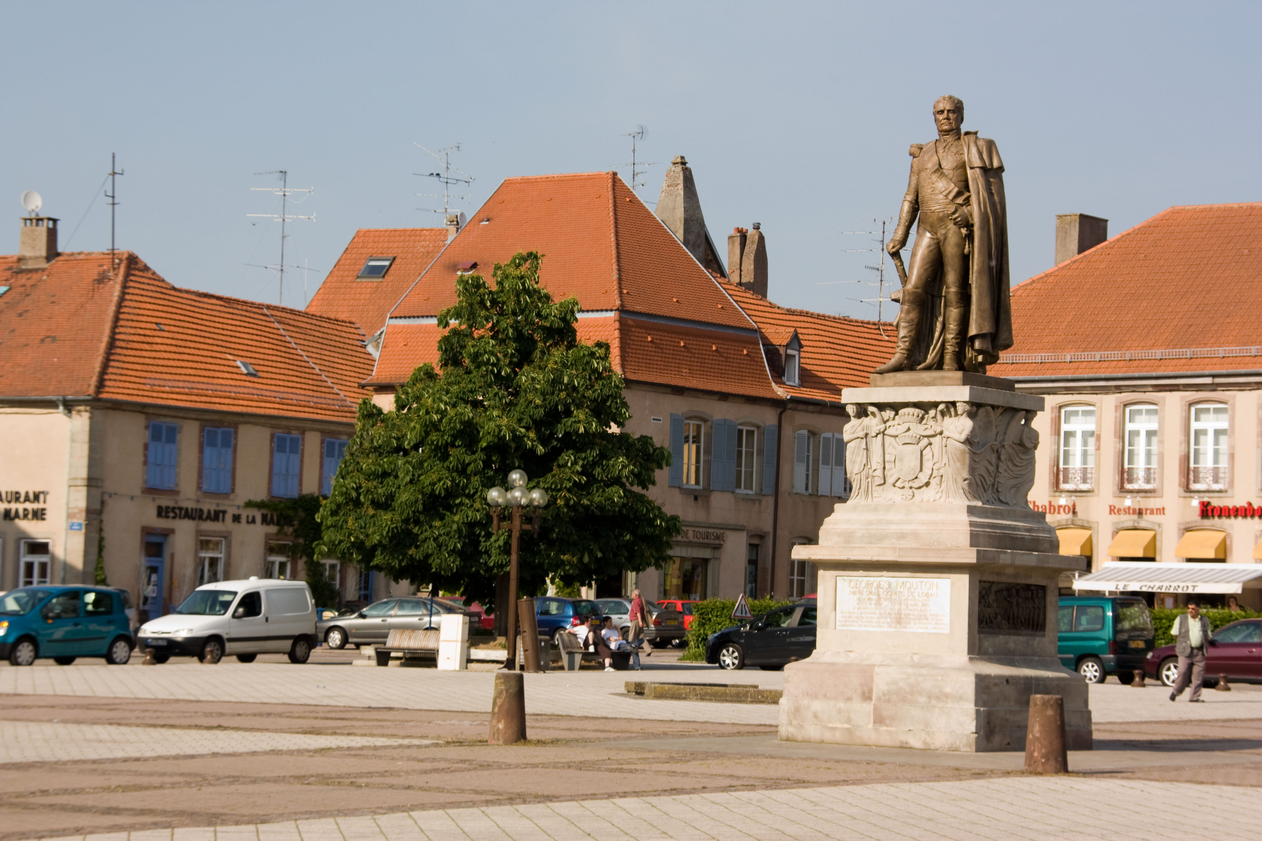 La statue Lobau sur la Place d’Armes de Phalsbourg, Phalsbourg, Moselle